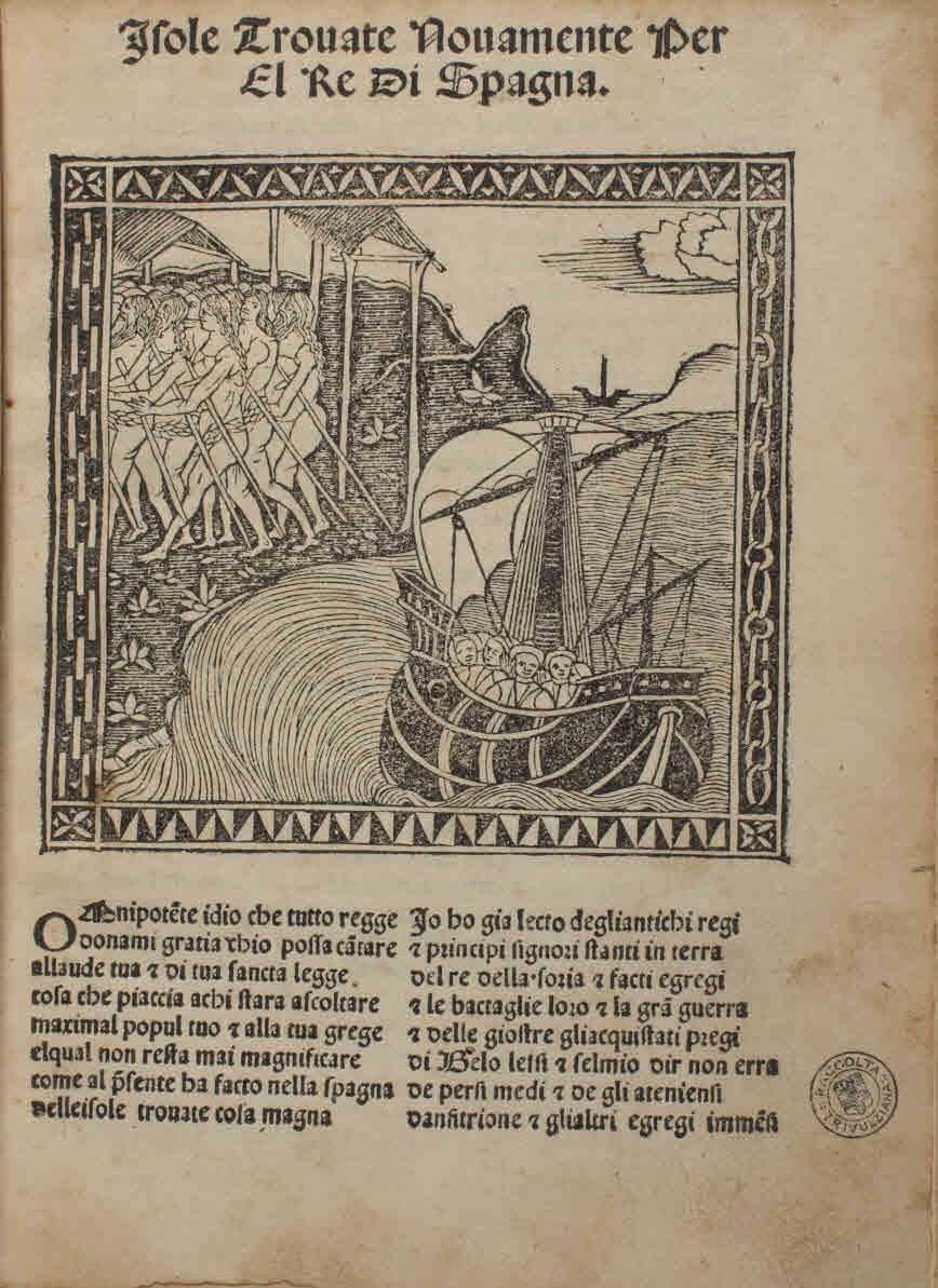 La scoperta di Colombo. Isole trovate nuovamente per el re di Spagna.